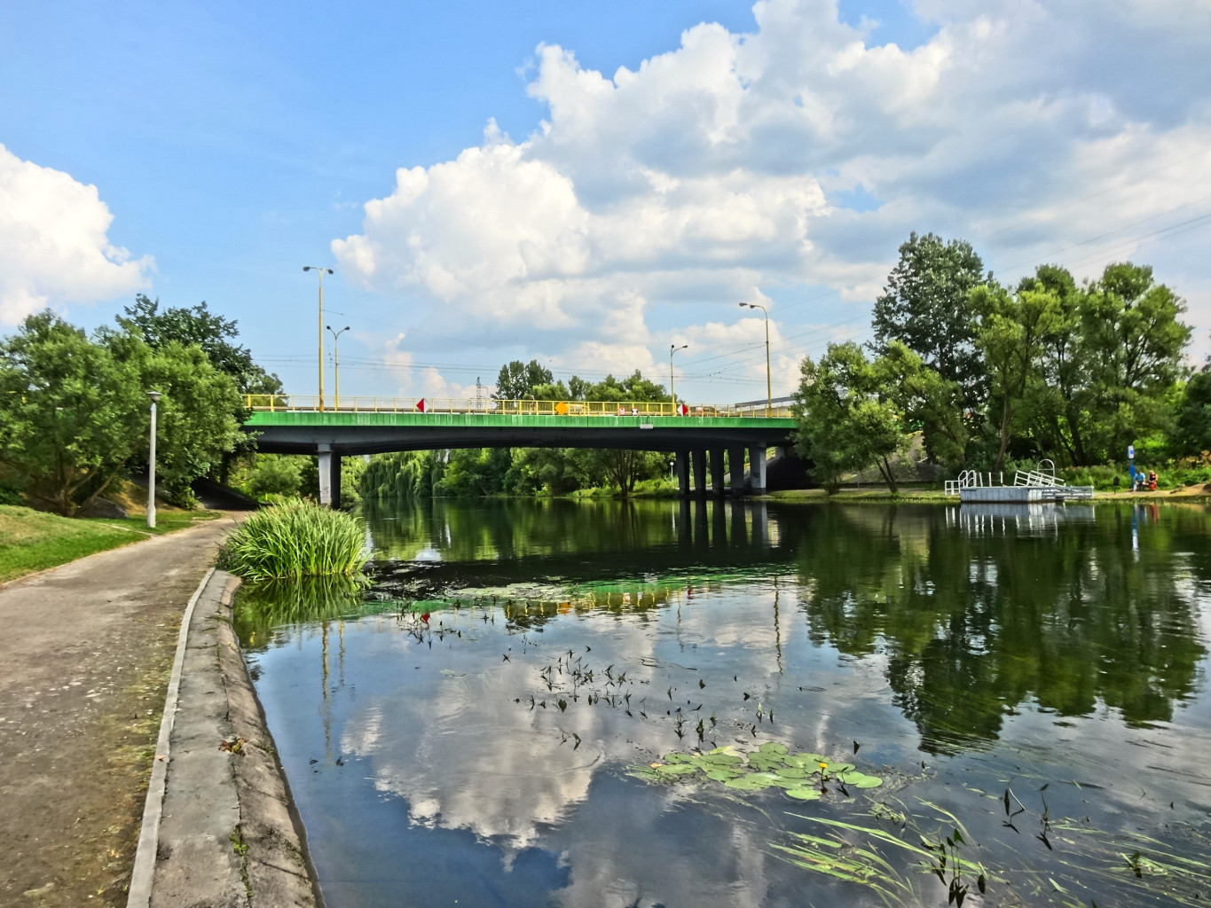 Most Pomorski nad Brdą w Bydgoszczy